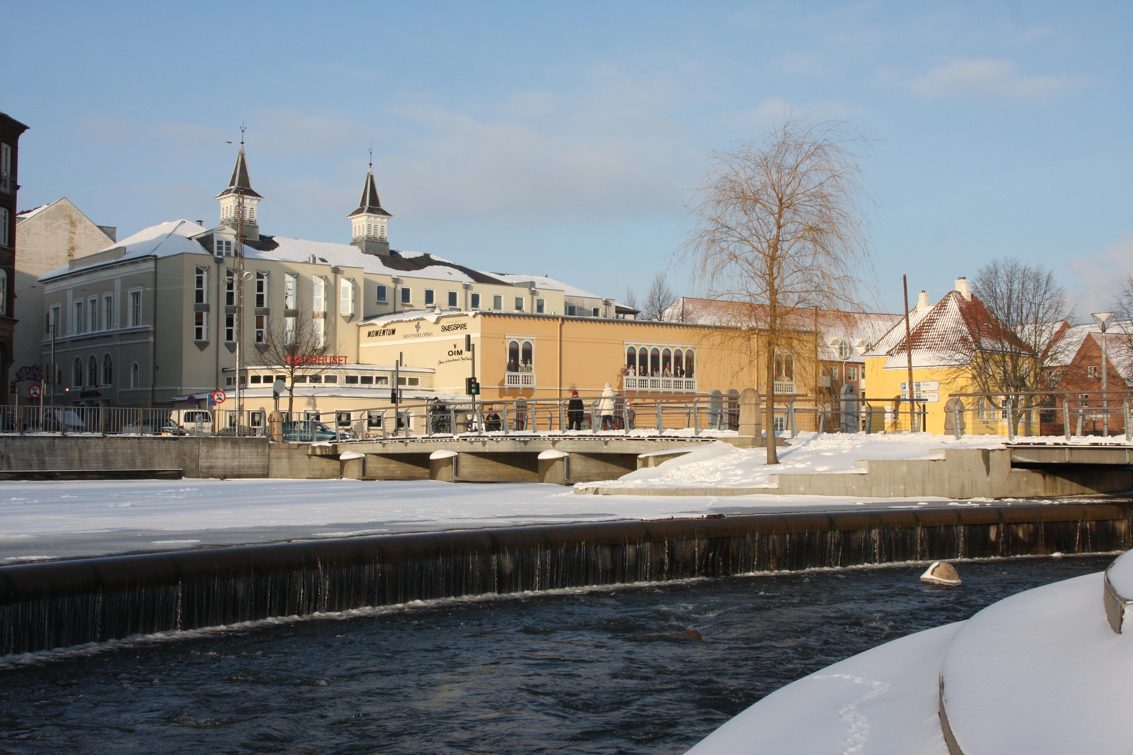 Teater Momentum i Odense / The Momentum Theatre in Odense, Funen, Denmark